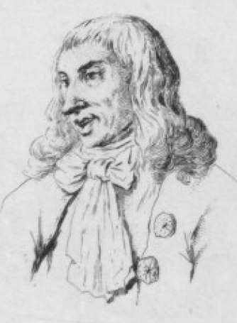 François Bedeau, dit Gorgibus, dit L'Espy, était un comédien français, né vers 1603, mort le 17 septembre 1663 à Cuillé. Comédien ordinaire du Roi. Il finit sa carrière dans la troupe de Molière.